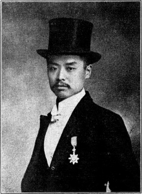 克希克圖，中華民國政治人物